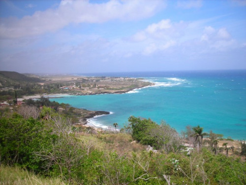 Litoral en Jibacoa Santa Cruz del Norte, Cuba.